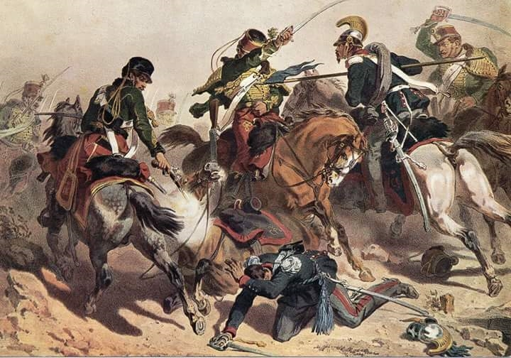 Il Brigadiere Mathieux di Piemonte Reale Cavalleria alla Sforzesca, copertina di calendario reggimentale tratta da una tavola di Stanislao Grimaldi del Poggetto